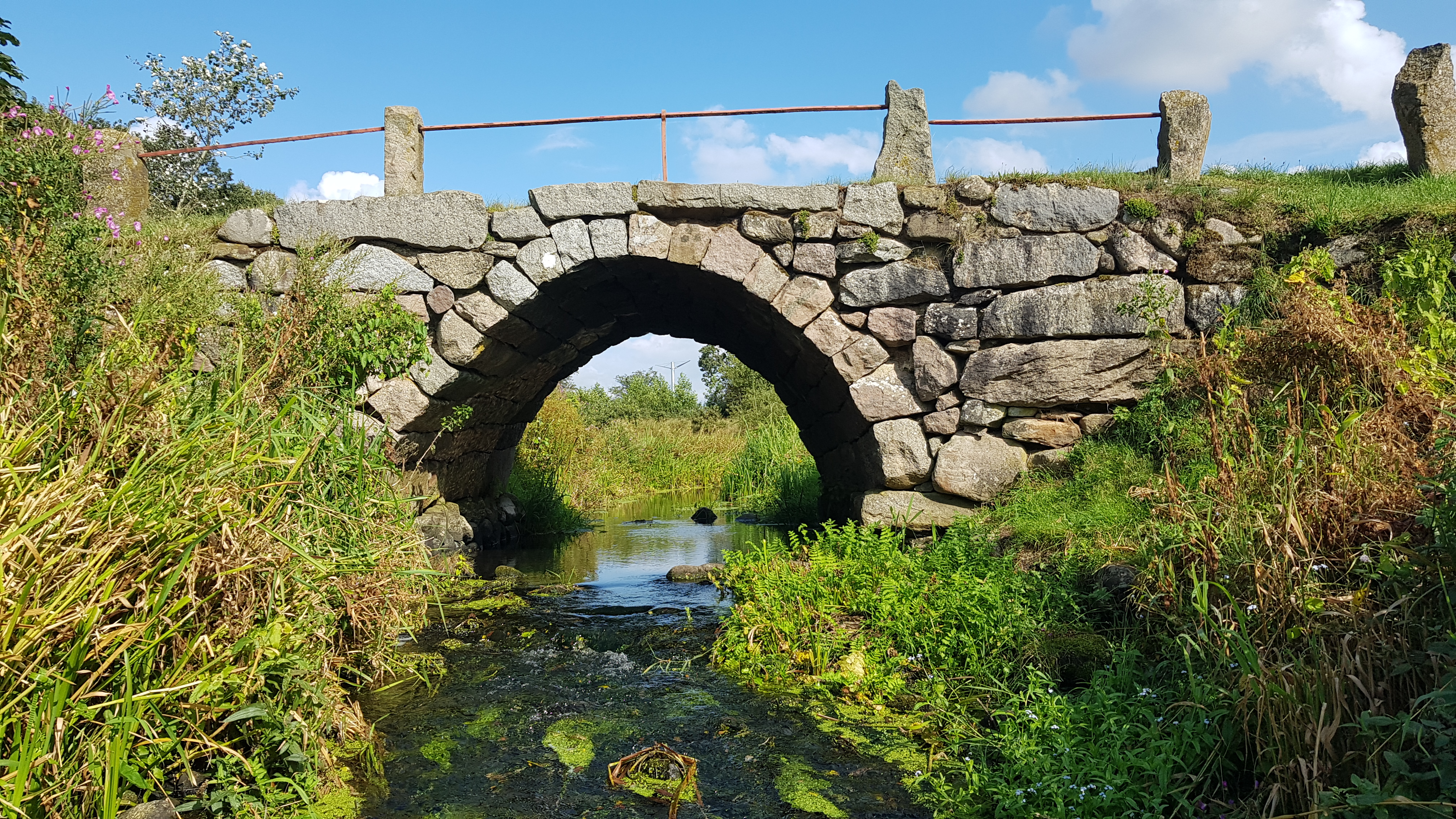 Povls Bro set fra vest